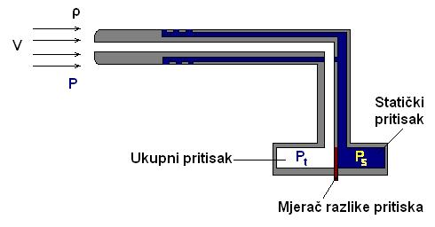 Pitot cijev